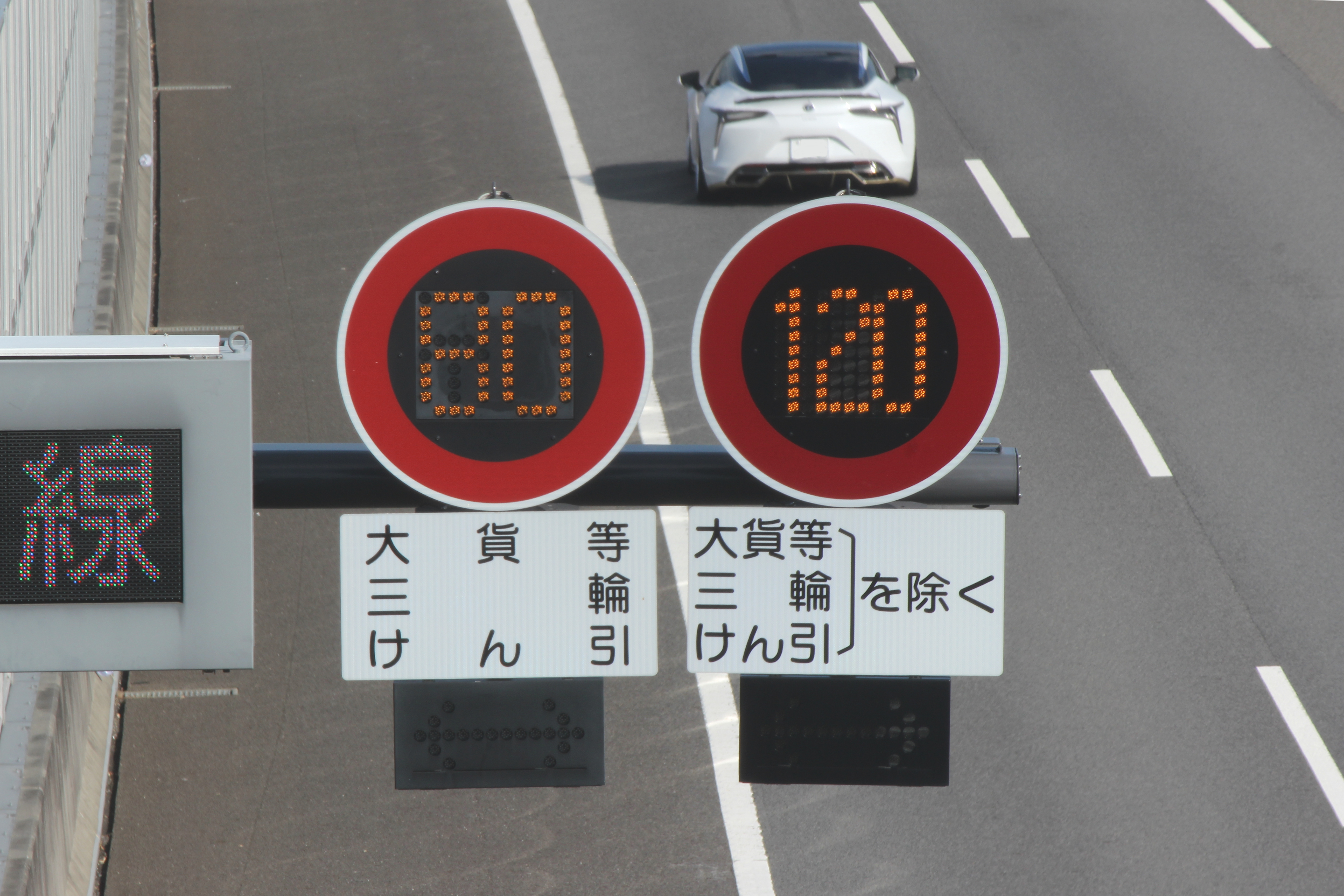 E1A新東名高速道路の可変式速度規制標識（島田金谷IC付近）